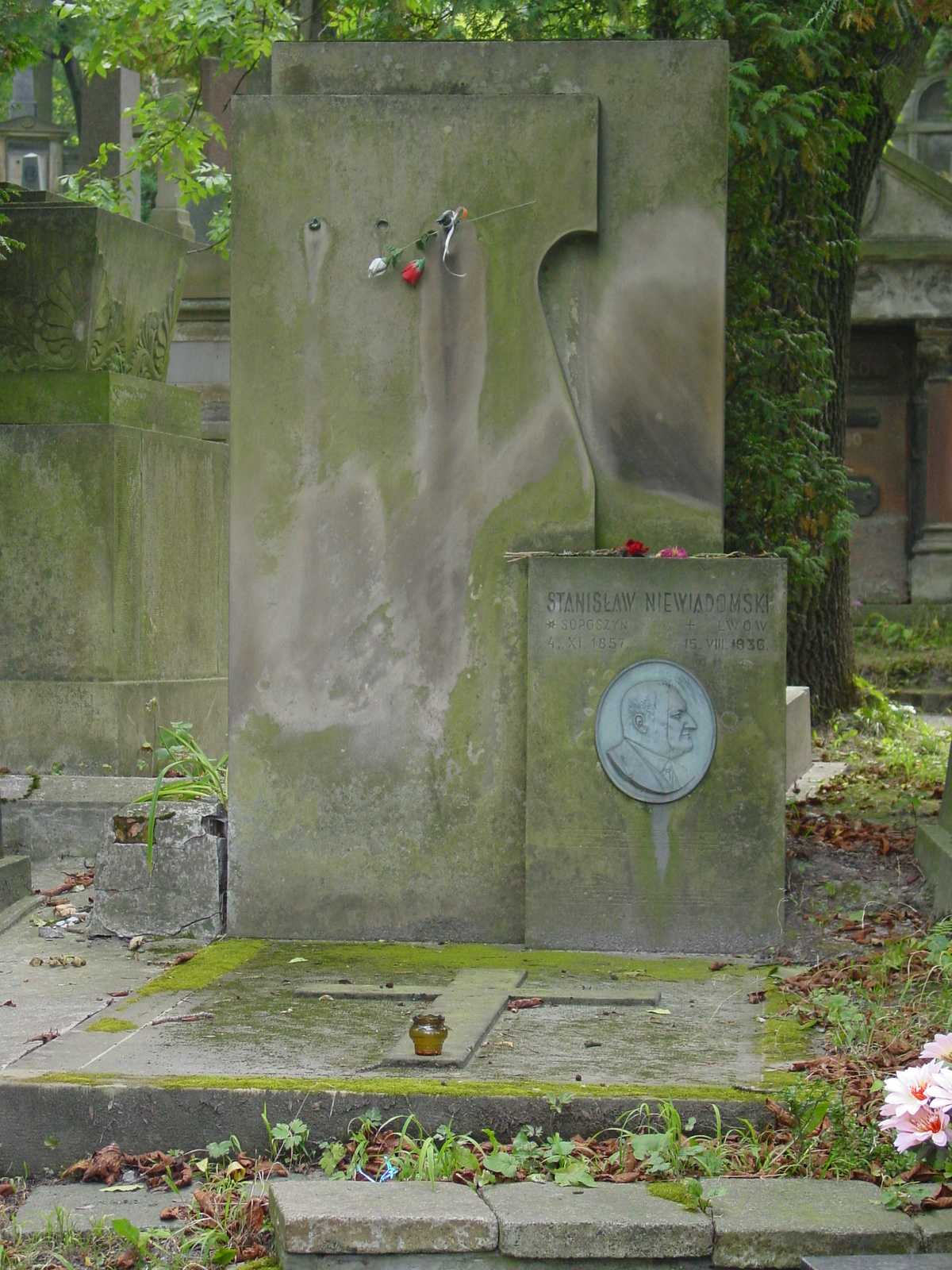 Lwów. Cmentarz Łyczakowski. Grób kompozytora Stanisława Niewiadomskiego. Autor fotografii Stanisław Kosiedowski. 13 września 2003.